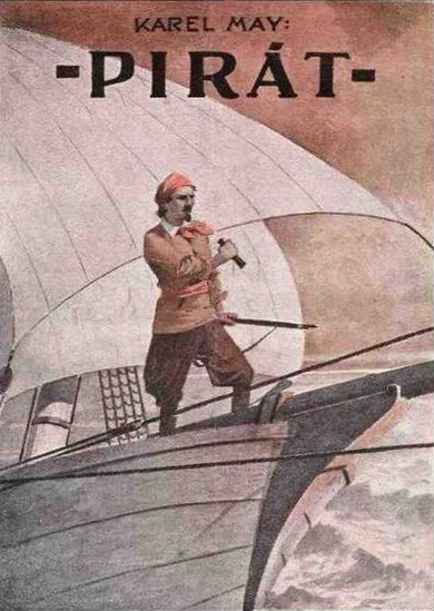 České vydání knihy Karla Maye Pirát z roku 1922 s obálkou od Karla Šimůnka